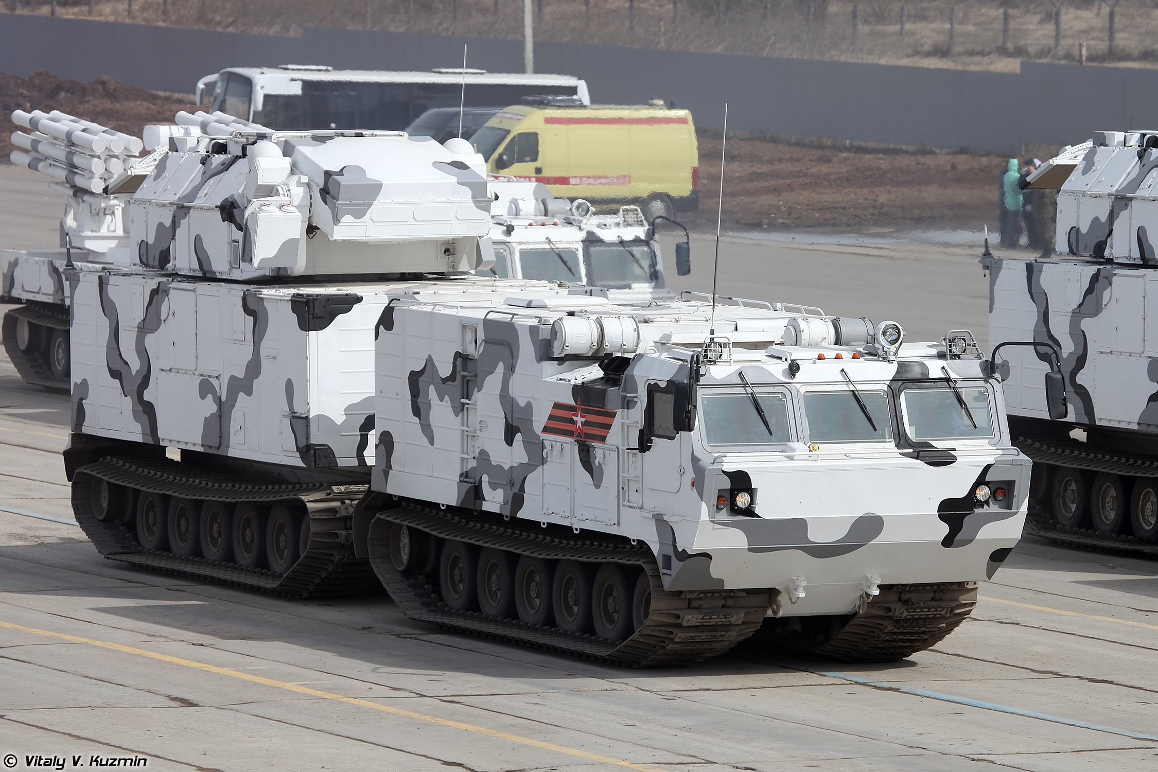 ЗРК 9К331МДТ Тор-М2ДТ на базе двухзвенного гусеничного транспортера ДТ-30ПМ (9K331MDT Tor-M2DT air defence system on DT-30PM transporter chassis)